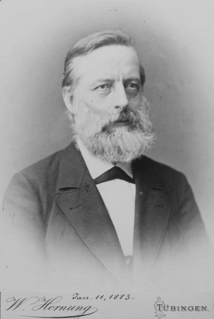 Lothar Meyer (* 19. August 1830 in Varel; † 11. April 1895 in Tübingen)